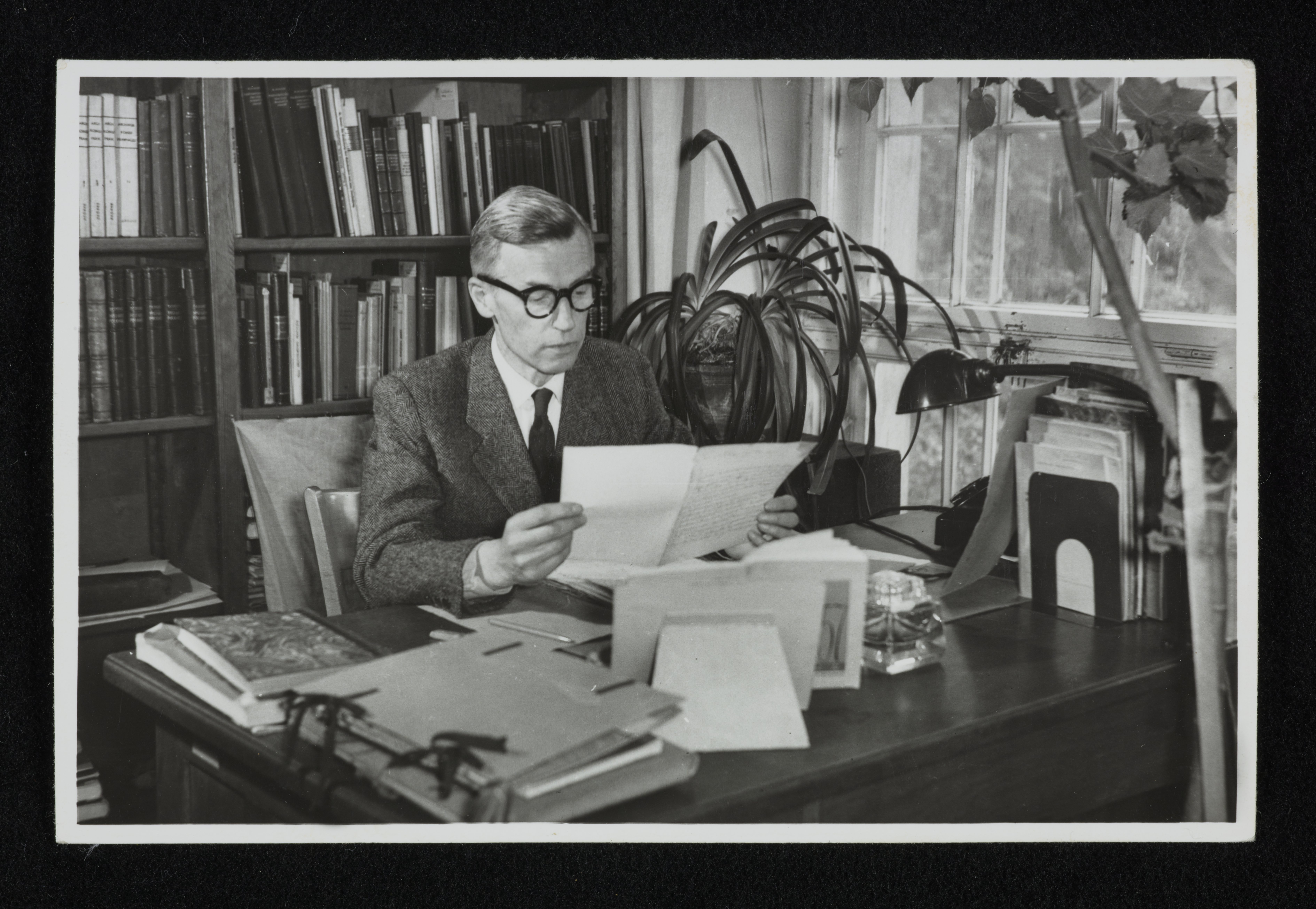 Bogdan Horodyski, 1956 r.